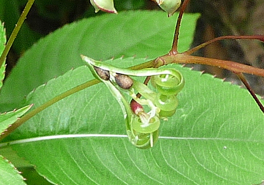 graine de balsamine de balfour